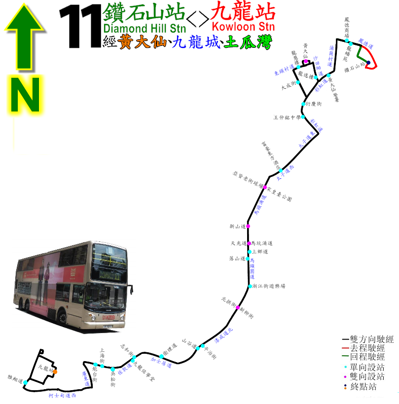 中文（香港）: 九巴11線的走線圖